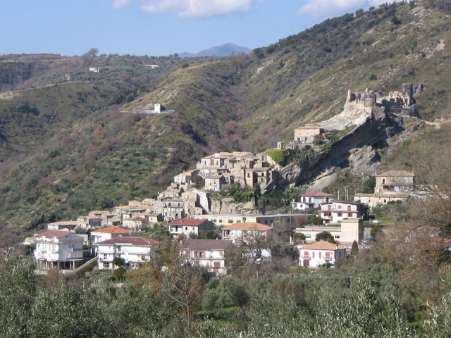 A view of Cleto